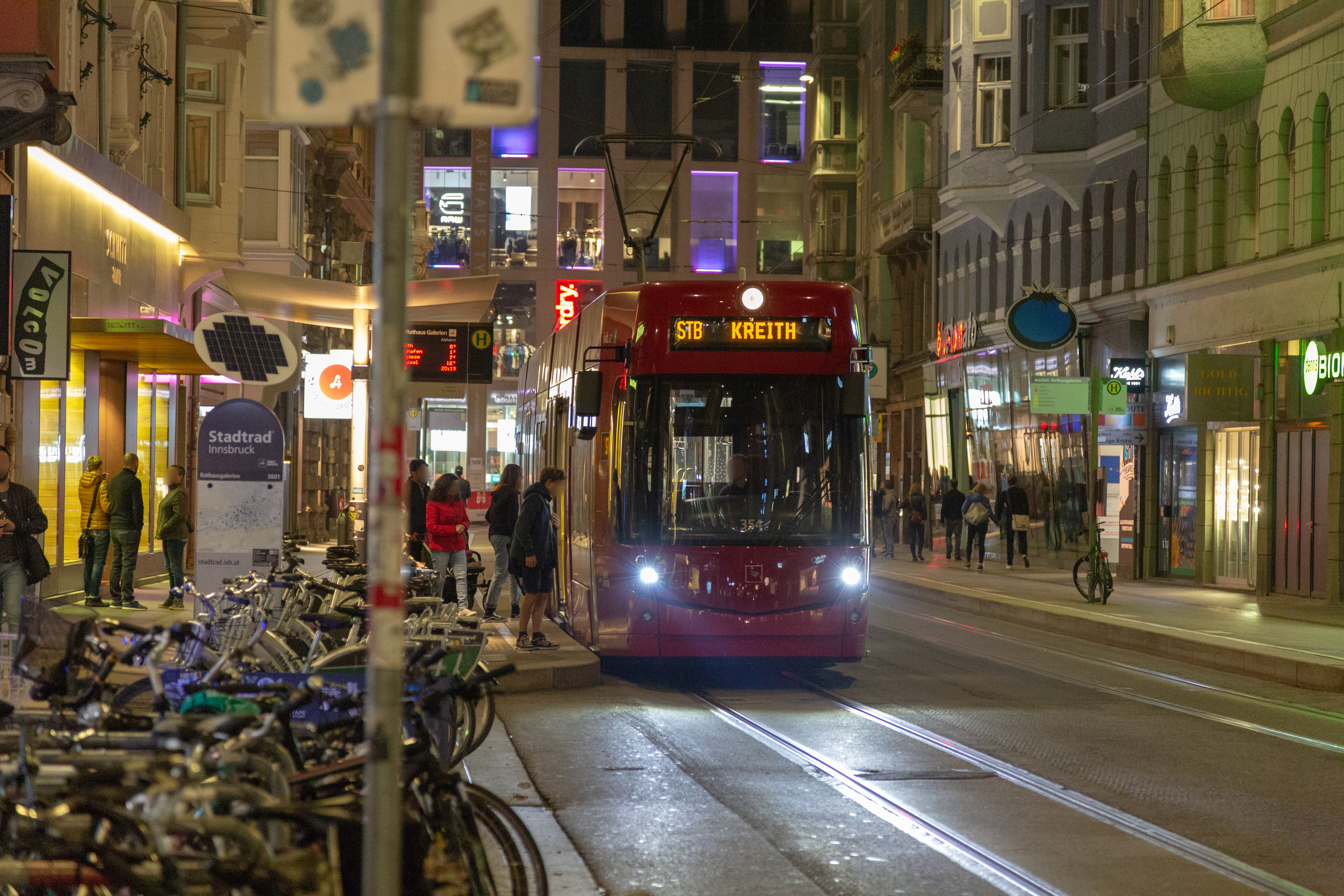 Innsbruck street car 354 at the Rathausgalerien stop on Anichstraße, at night.